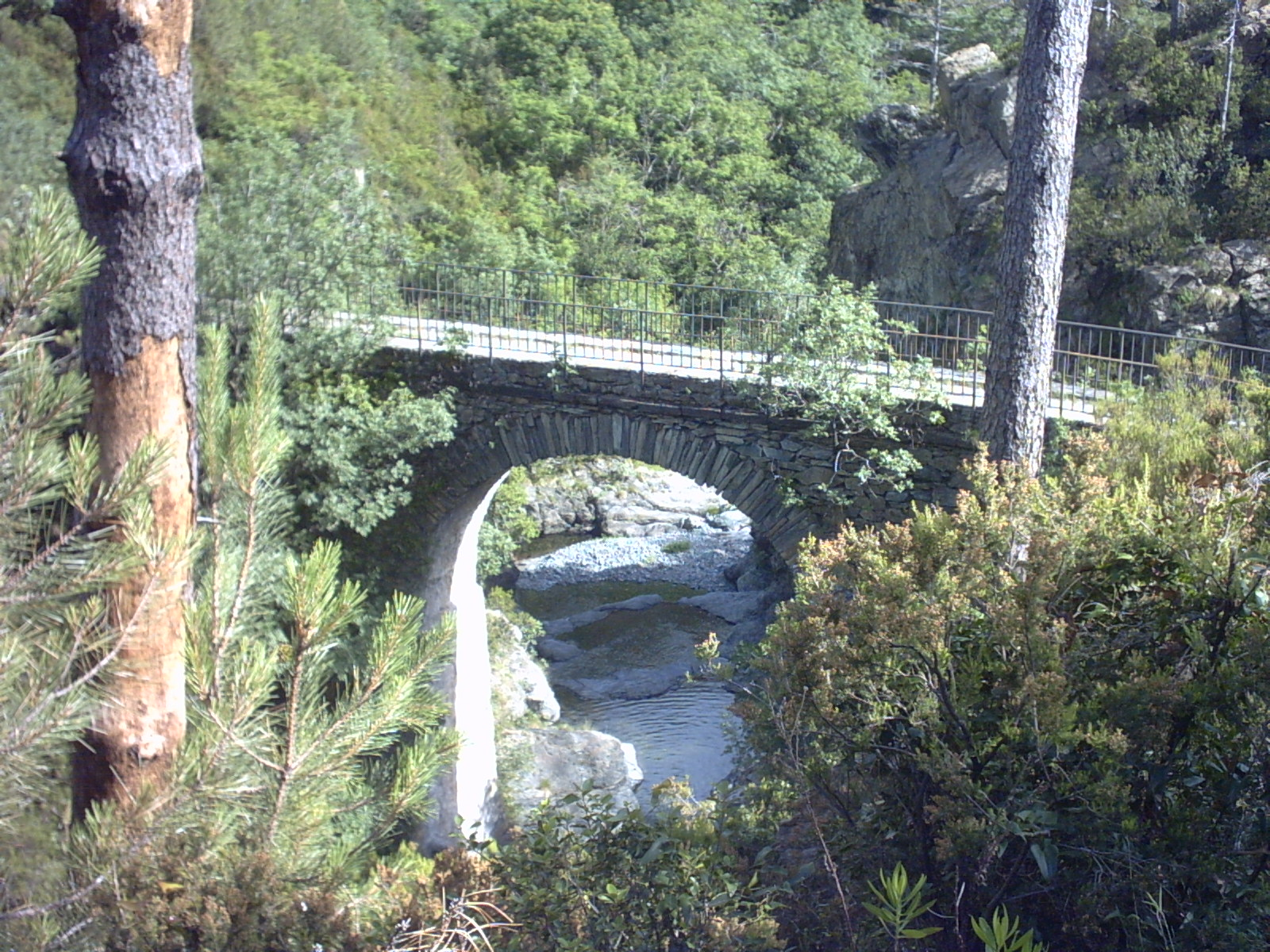 Ponte Negrone, Arenzano (Italy)